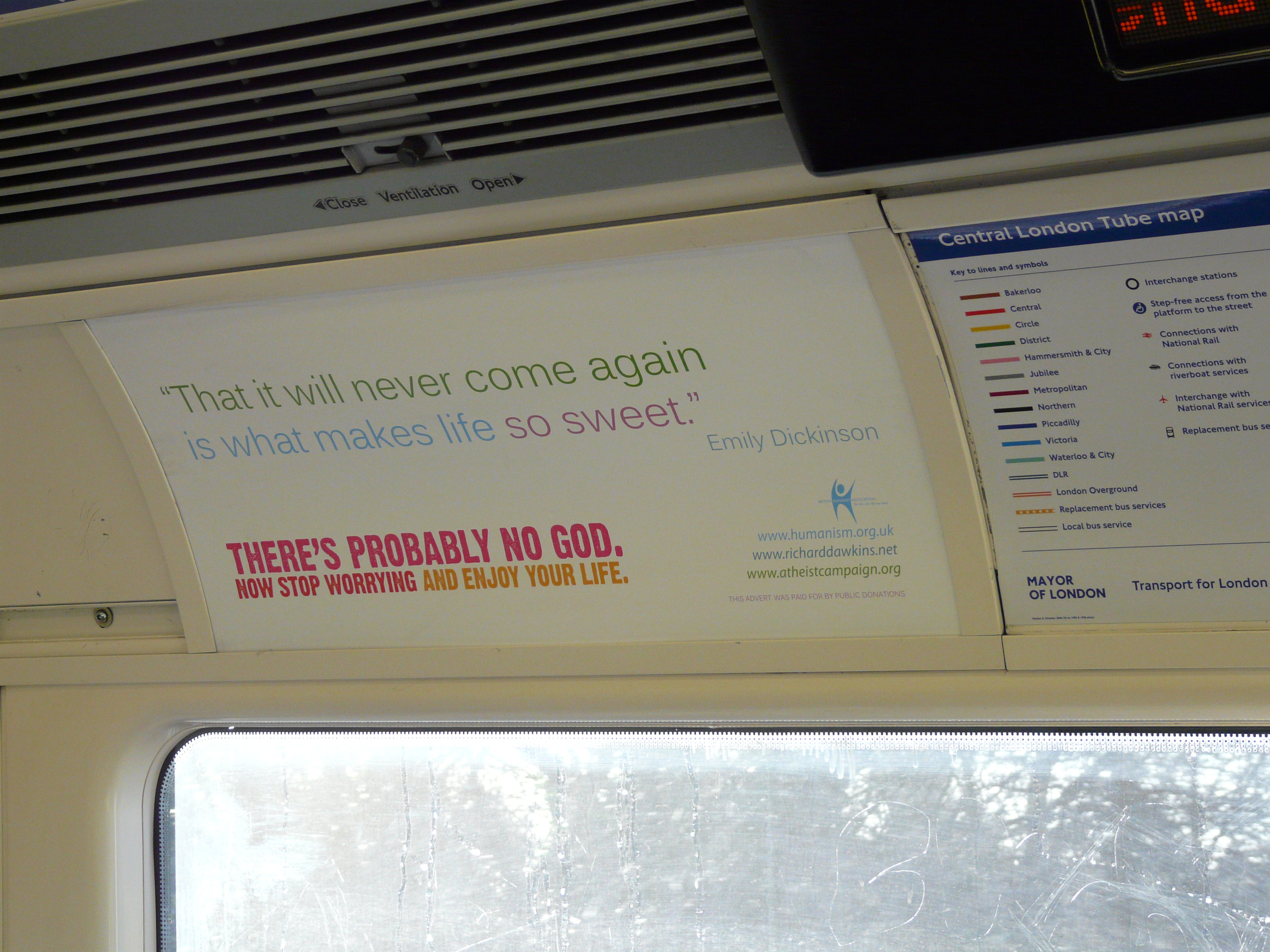 Plakat der Atheist Bus Campaign in einem Zug der Londoner U-Bahn